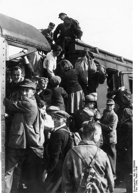 Bahnhof Eberswalde, Pfingst-Reiseverkehr Zentralbild/Cürlis Reiseverkehr zu Pfingsten 1946 Auf dem Bahnhof Eberswalde 249-46 [Bahnhof Eberswalde.- Pfingst-Reiseverkehr, Menschen an der Außenseite eines Eisenbahnwaggons]